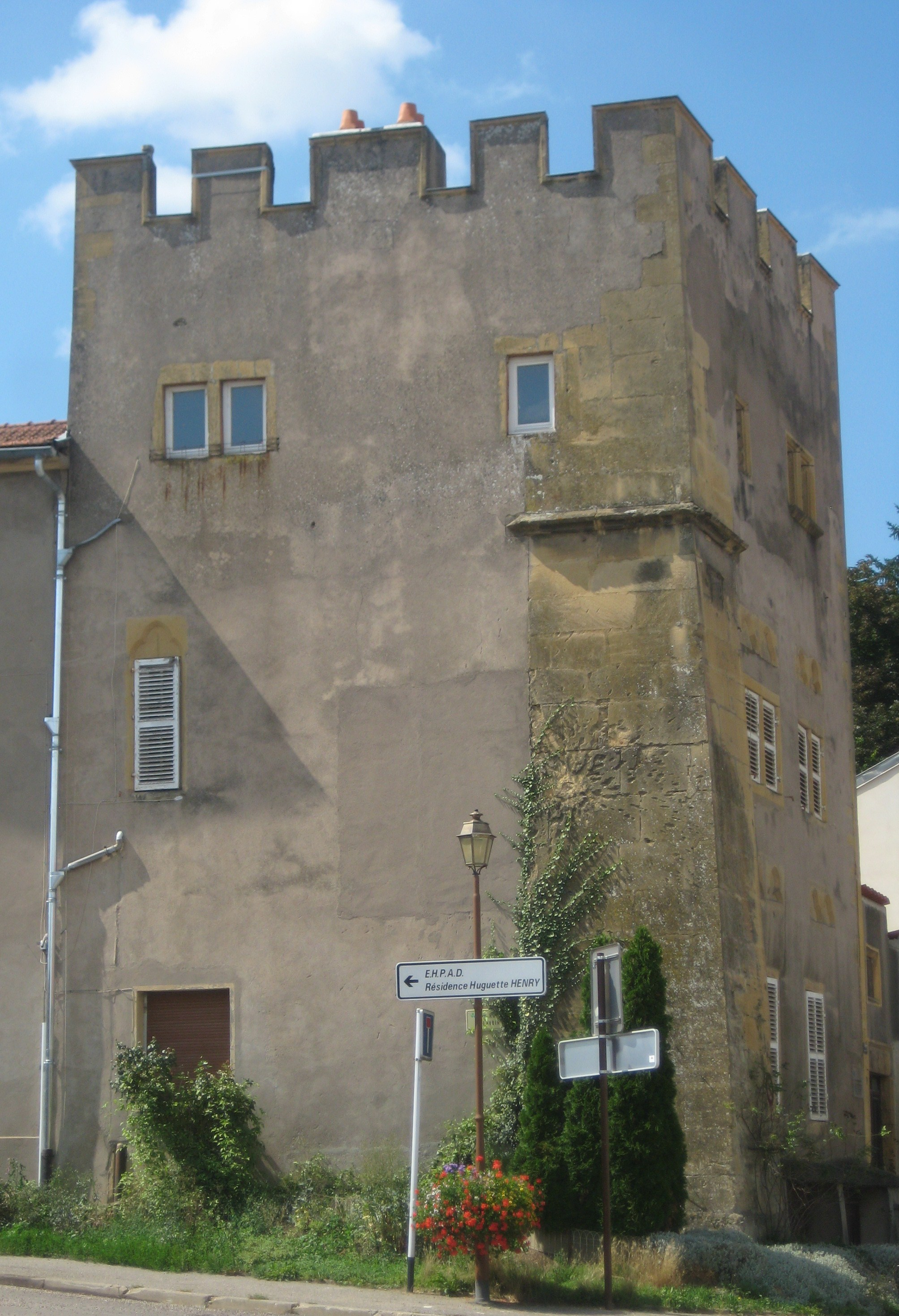 Description Haute-Maison de Cléry Woippy Date4 August 2011Sourcemon appareil photoAuthorAimelaimePermission (Reusing this file) Haute-Maison de Cléry Woippy